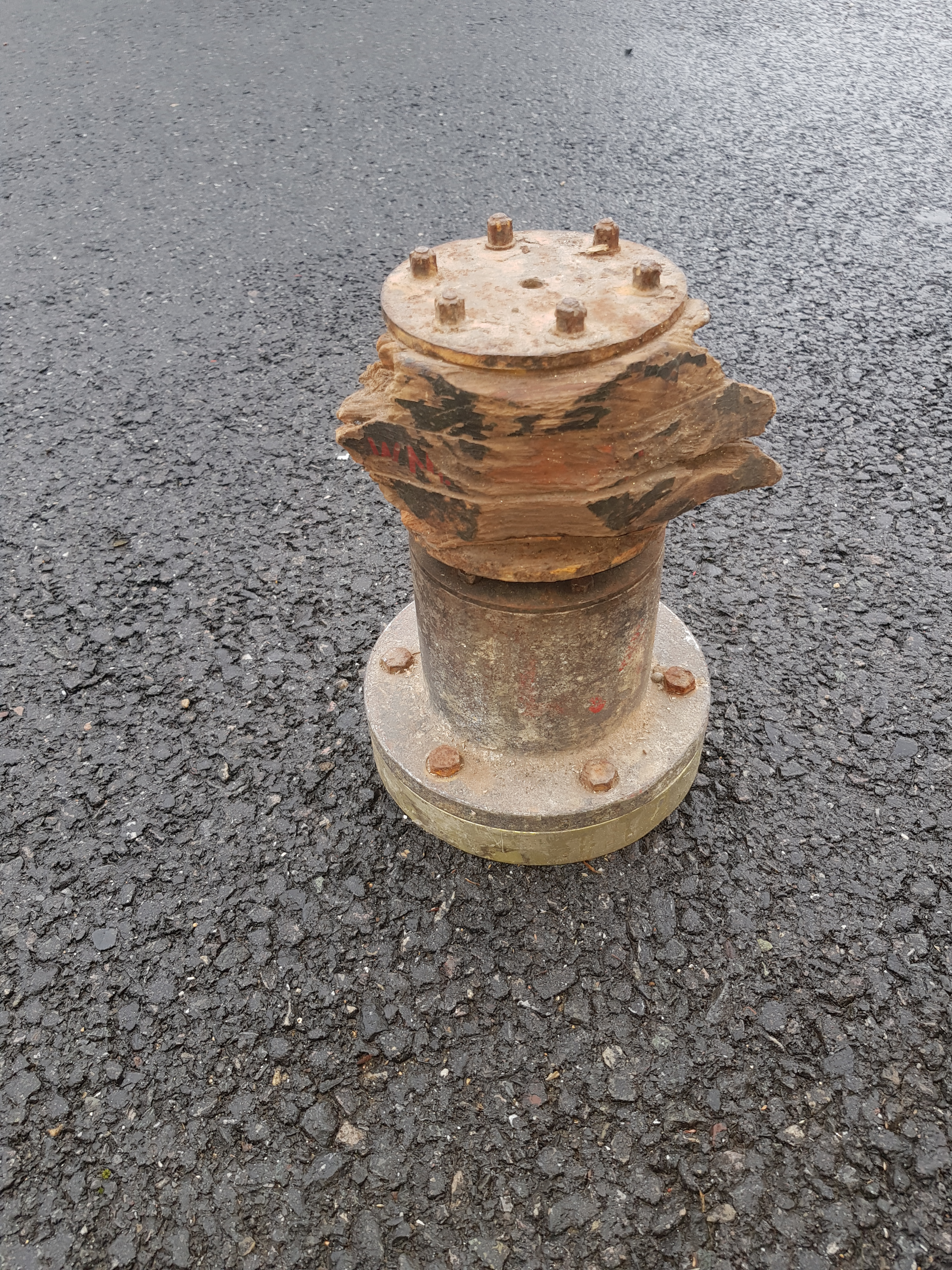 Sirène du Junker 87B-1 de la 2./Stg77 abattu aux Grandes Armoises (Ardennes) lors de la bataille de Sedan le 14 mai 1940. Pilote Uffz Robert Munk et Uffz Karl Wagner.